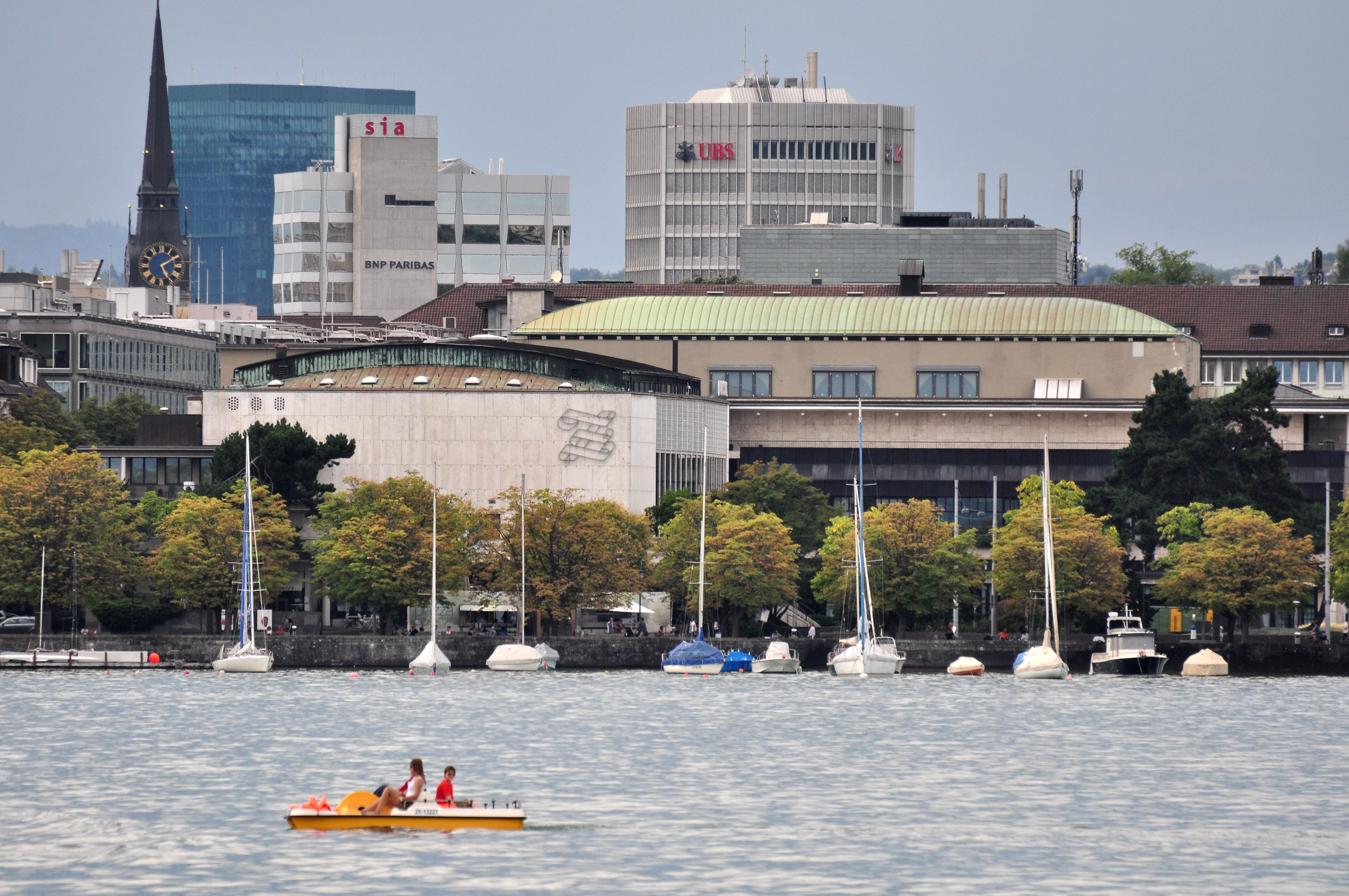 General-Guisan-Quai, Kongresshaus in Zürich (Switzerland), as seen from Zürichsee-Schifffahrtsgesellschaft (ZSG) motorship Helvetia, Werd district in the background.